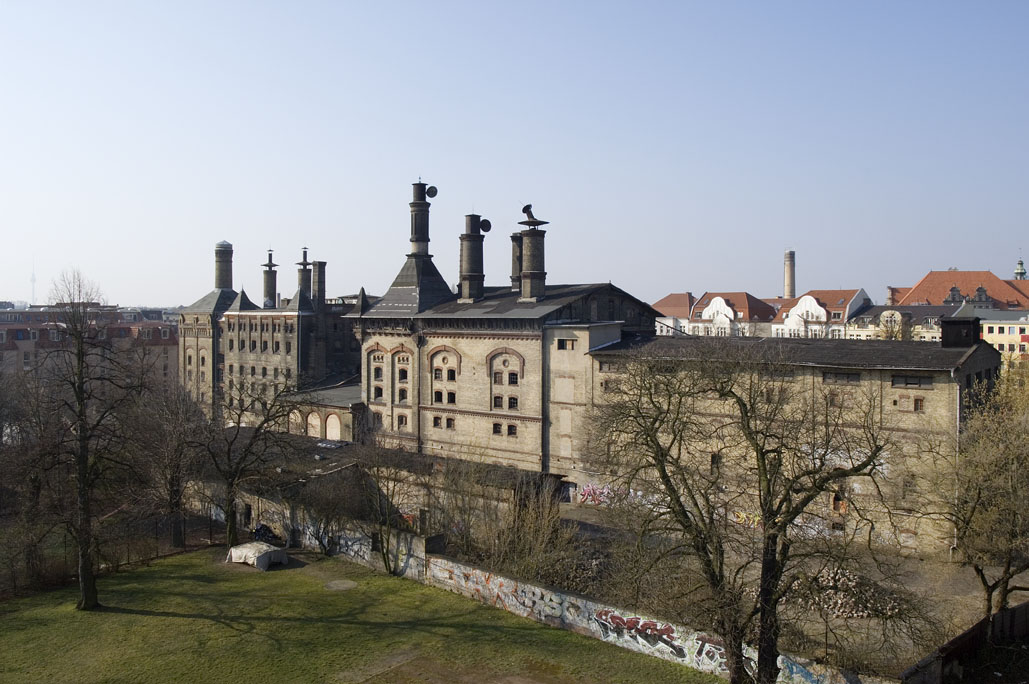 Berlin-Pankow, Mühlenstr. 9-11, Mälzerei: Geamtansicht von Nordosten.